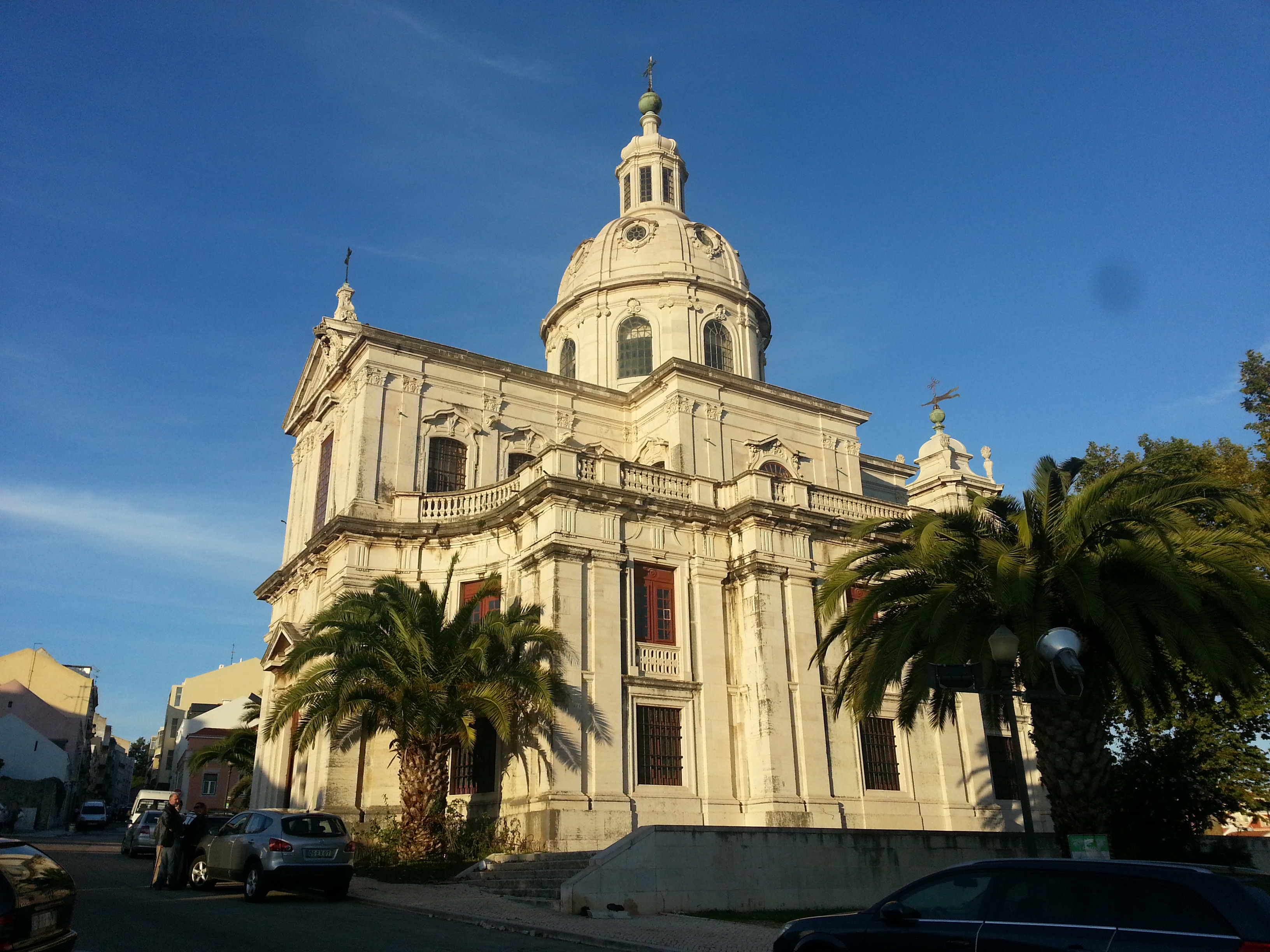 Igreja do Memoria 2013, Lisbon Portugal